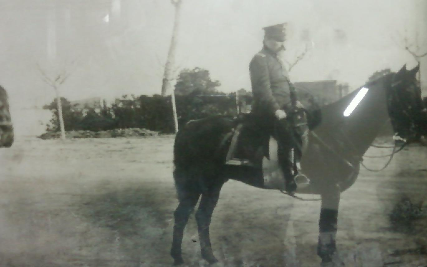 Imagen del gobernador tomada en 1894.